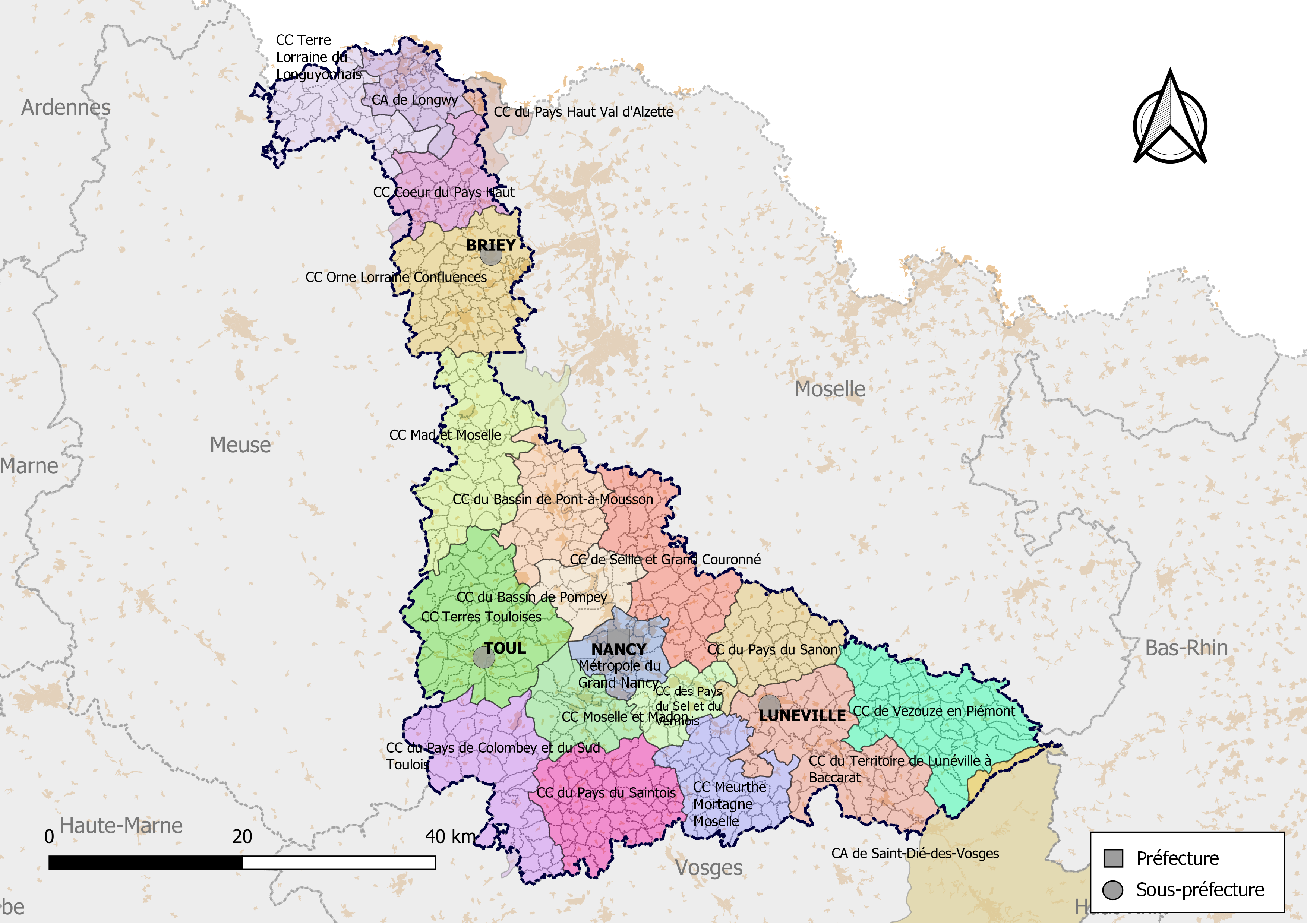 Carte des intercommunalités du département de Meurthe-et-Moselle, France. Composition au 1er janvier 2019.